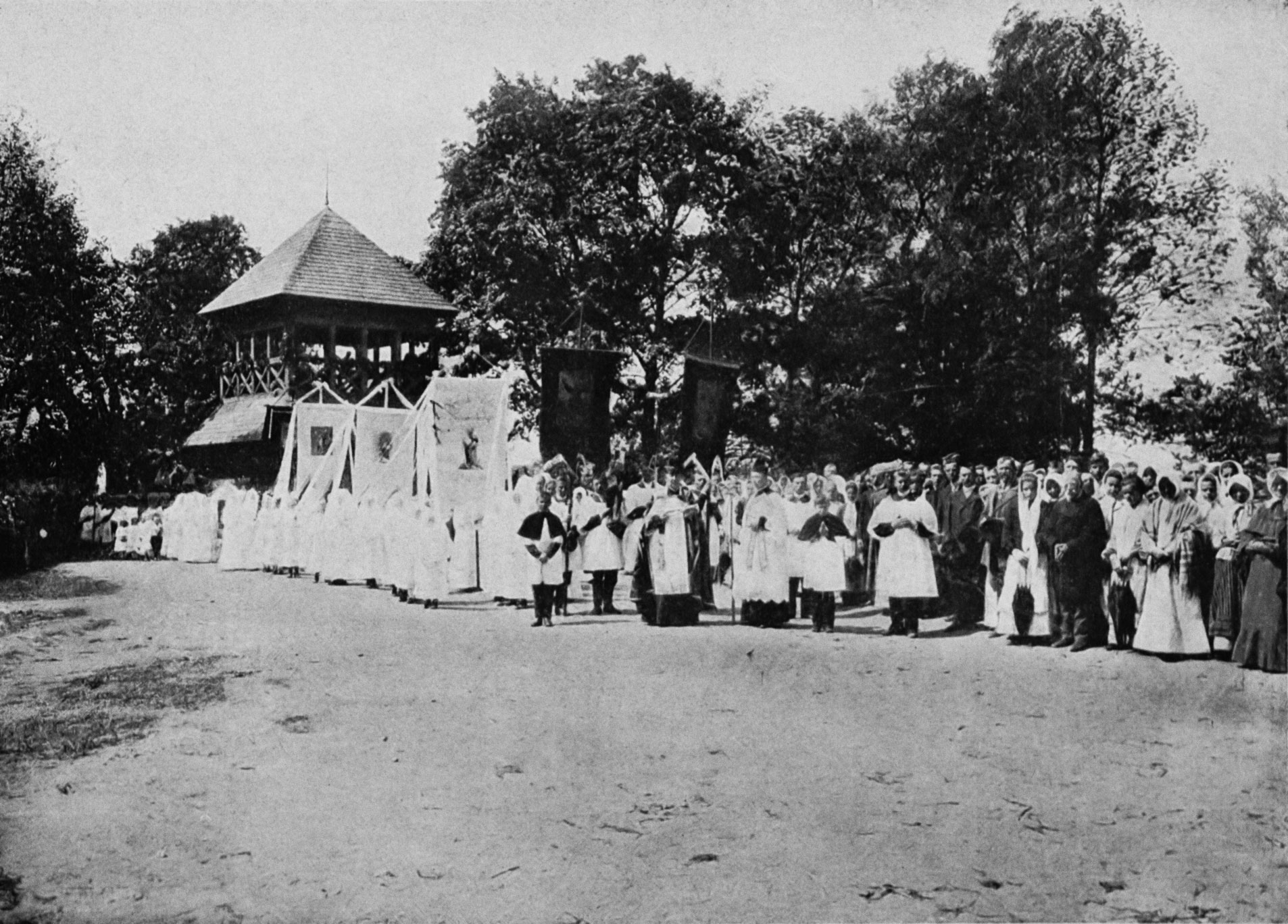 Беларуская (тарашкевіца): Камень (Kamień). Урачыстая працэсія каля касьцёла